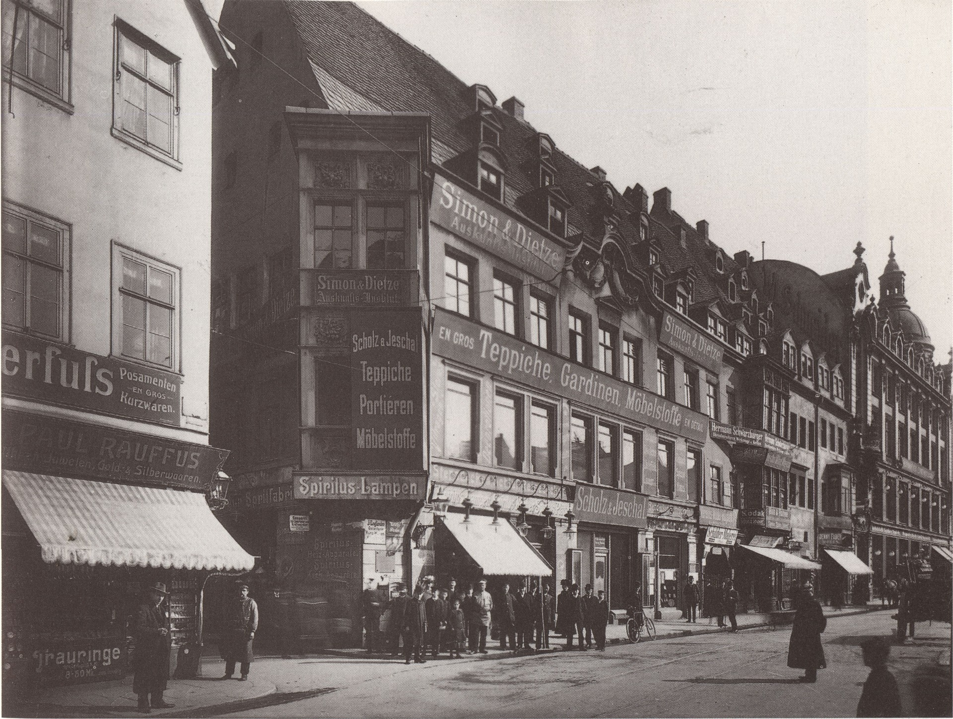 Die Reichsstraße um 1900. Späterer Standort des Specks Hof und des Riquethauses.